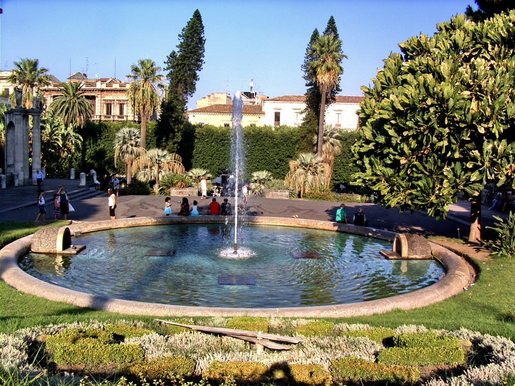 Vasca dei cigni vista guardando via Etnea dalla parte superiore dell'orologio.